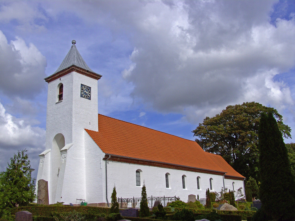 fra sydvest